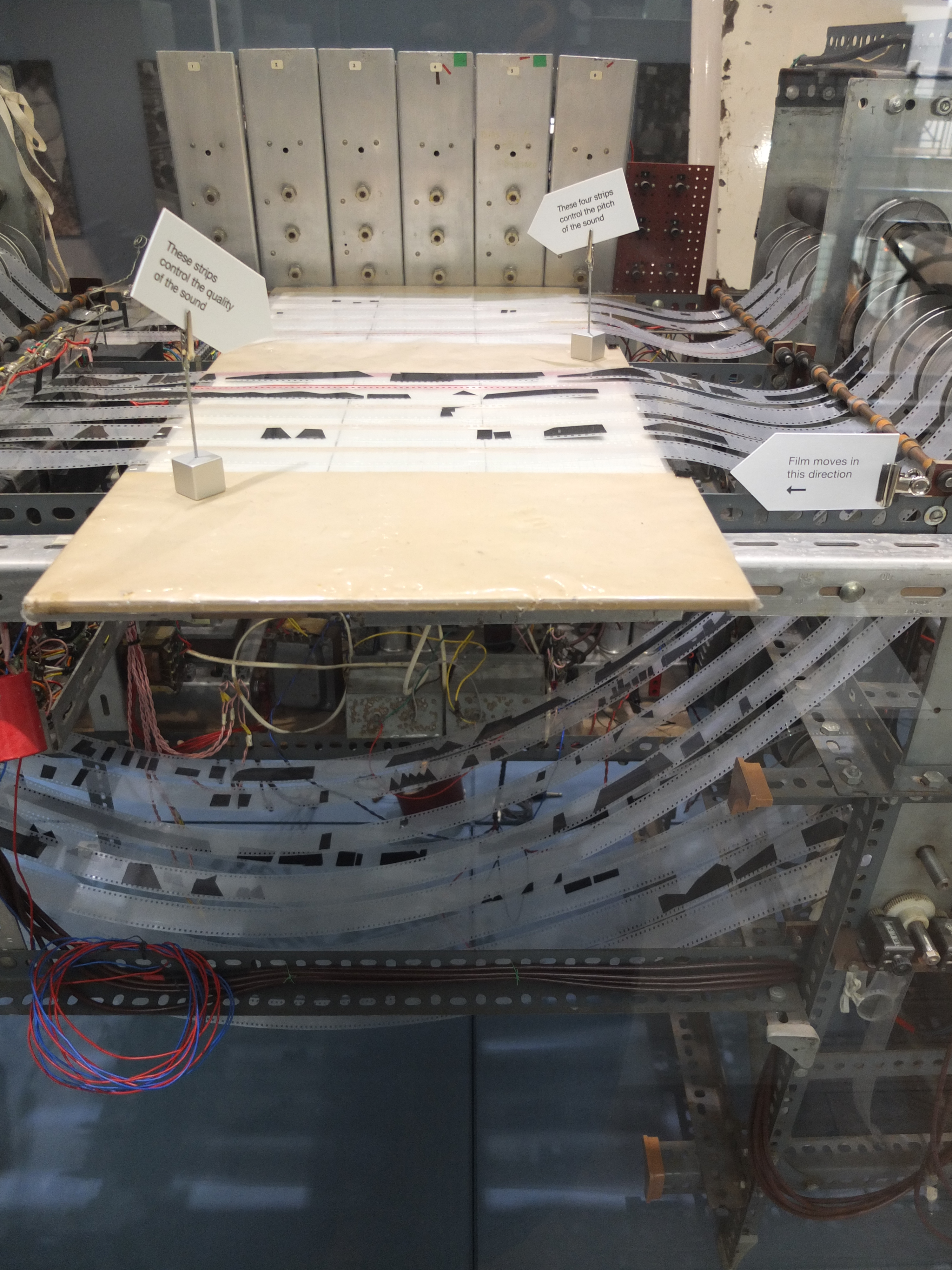 Daphne Oram's Oramics Machine